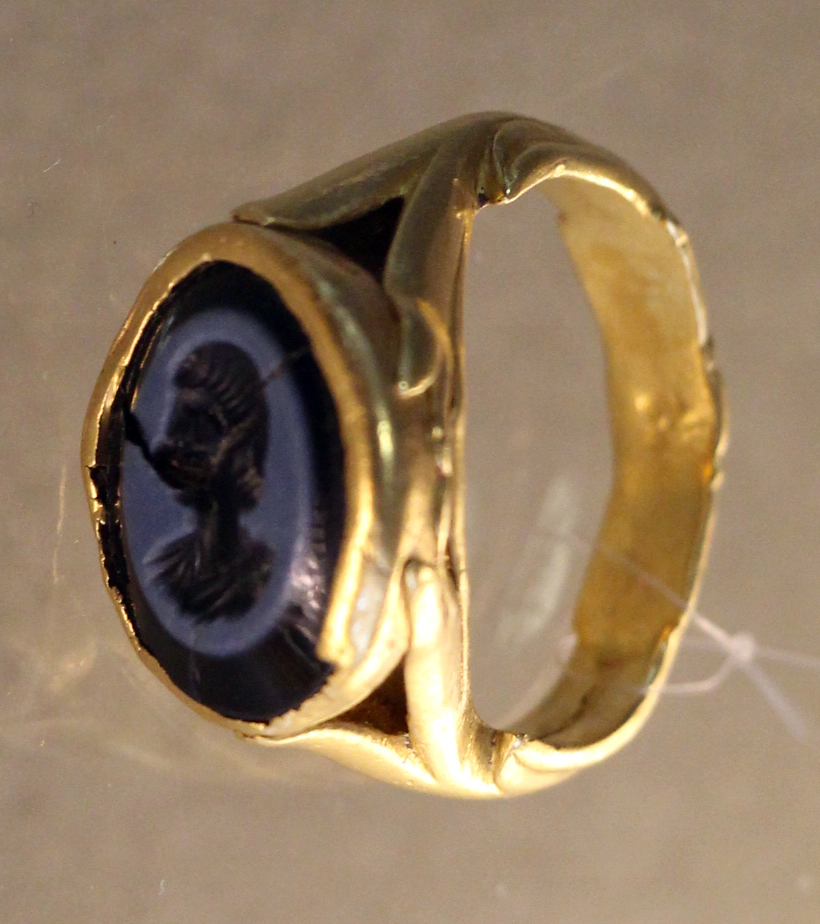 Museo archeologico nazionale G.A. Sanna - MIBAC The making of this document was supported by Wikimedia CH. (Submit your project!) For all the files concerned, please see the category Supported by Wikimedia CH. This is a photo of a monument which is part of cultural heritage of Italy.